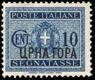 Доплатная марка Черногории под итальянской оккупацией. Надпечатка на доплатной марке Италии 1934 года.